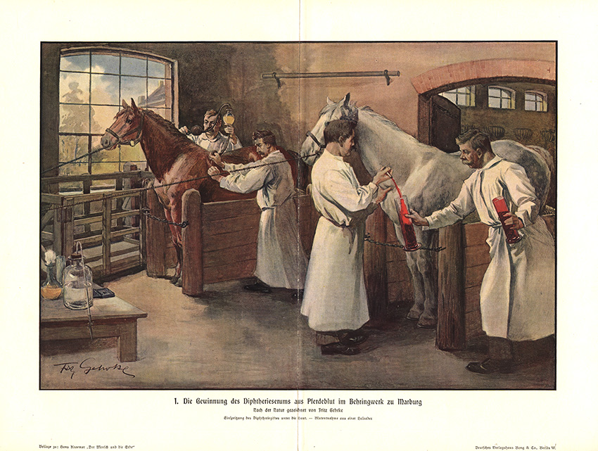 "Die Gewinnung des Diphterieserums aus Pferdeblut im Behringwerk zu Marburg"